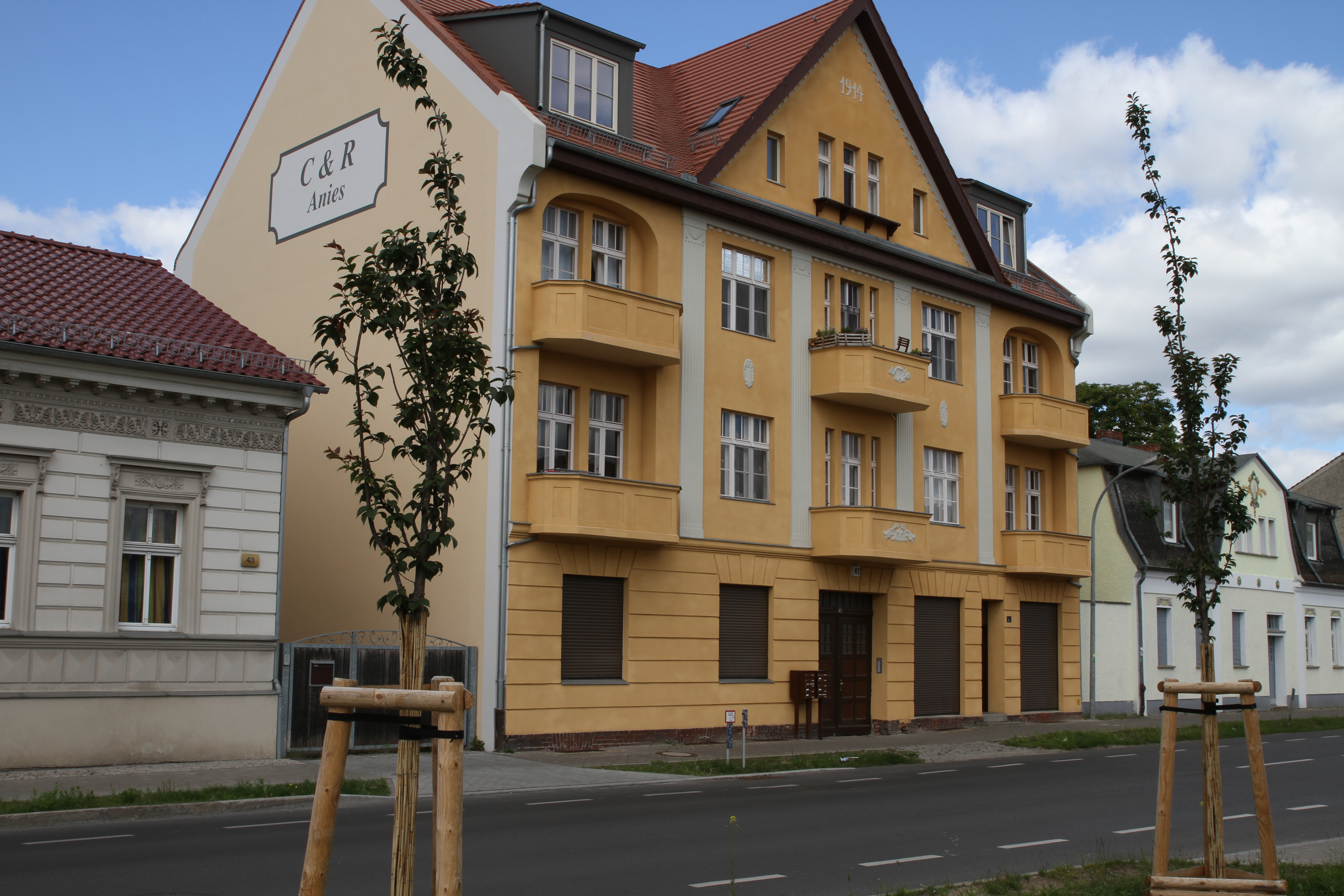 Denkmalgeschütztes Wohnhaus in Velten Breite Straße 42